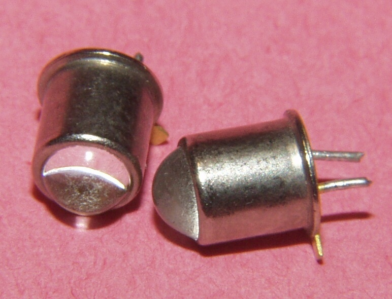 Fotodiode